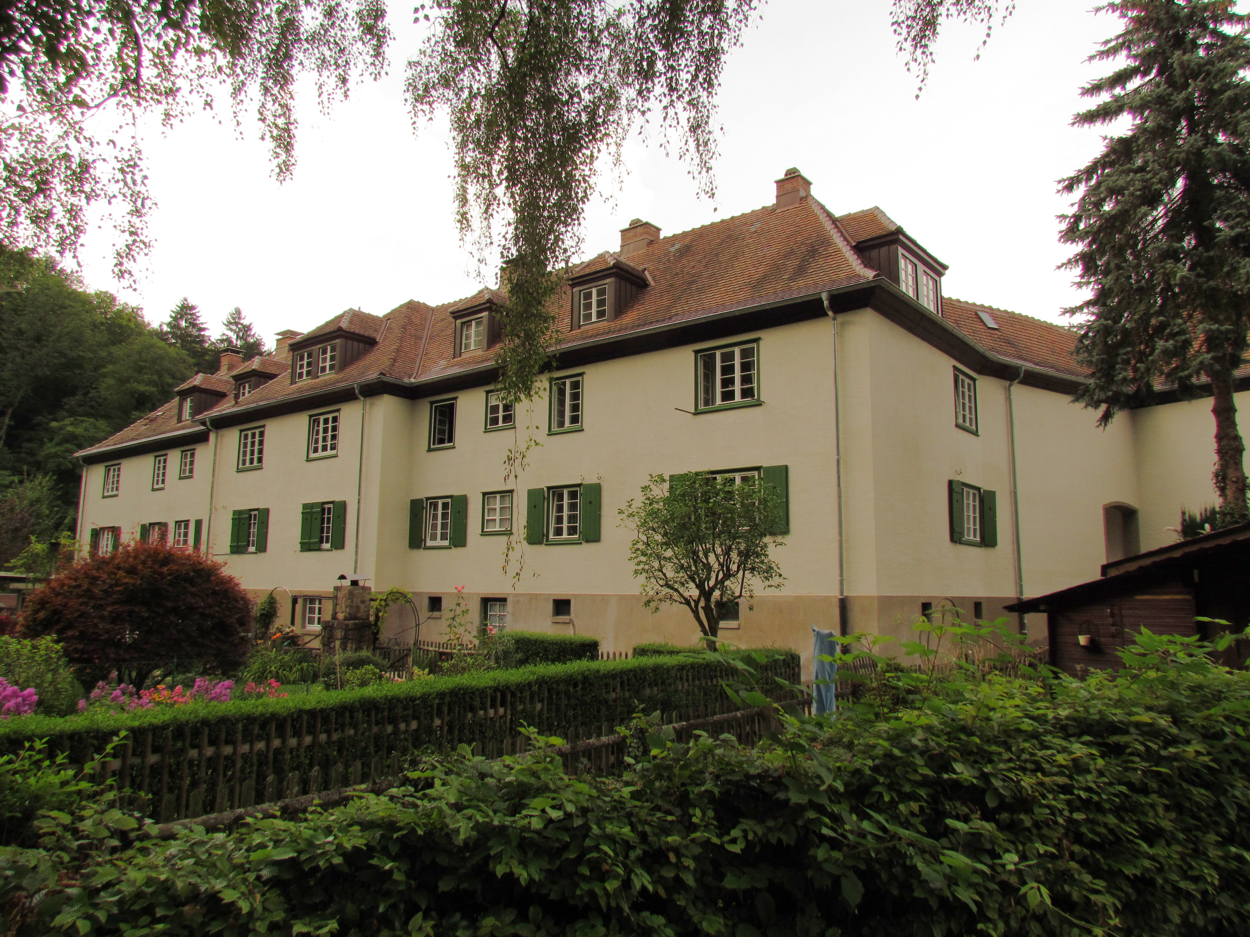 Bildinhalt: Ooswinkel in Baden-Baden Aufnahmeort: Baden-Baden, Deutschland